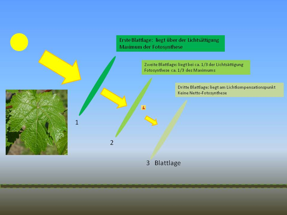 Einfluss der Blattlage auf die Fotosyntheseleistung des Rebblattes